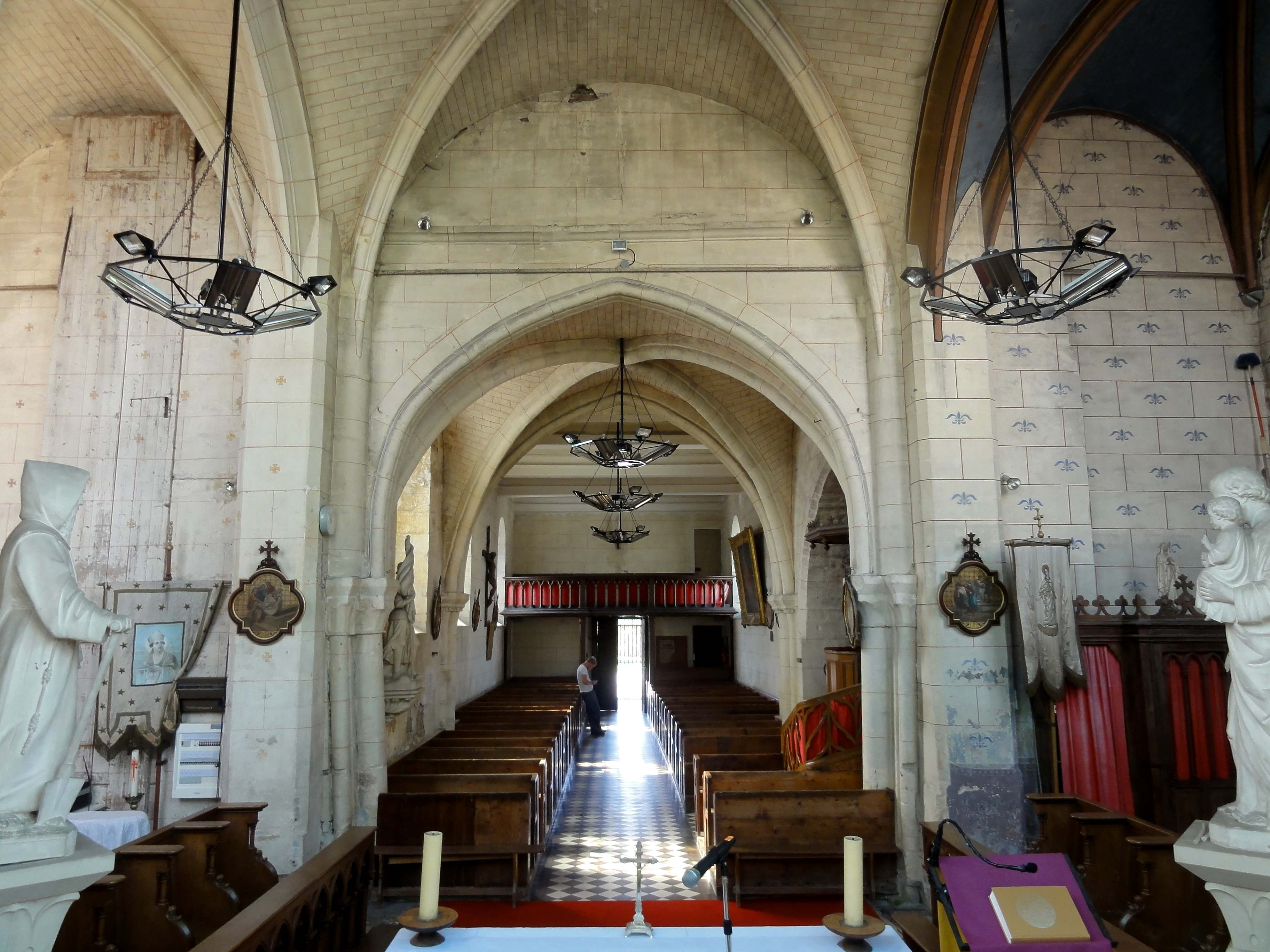 Intérieur de l'église (voir titre).